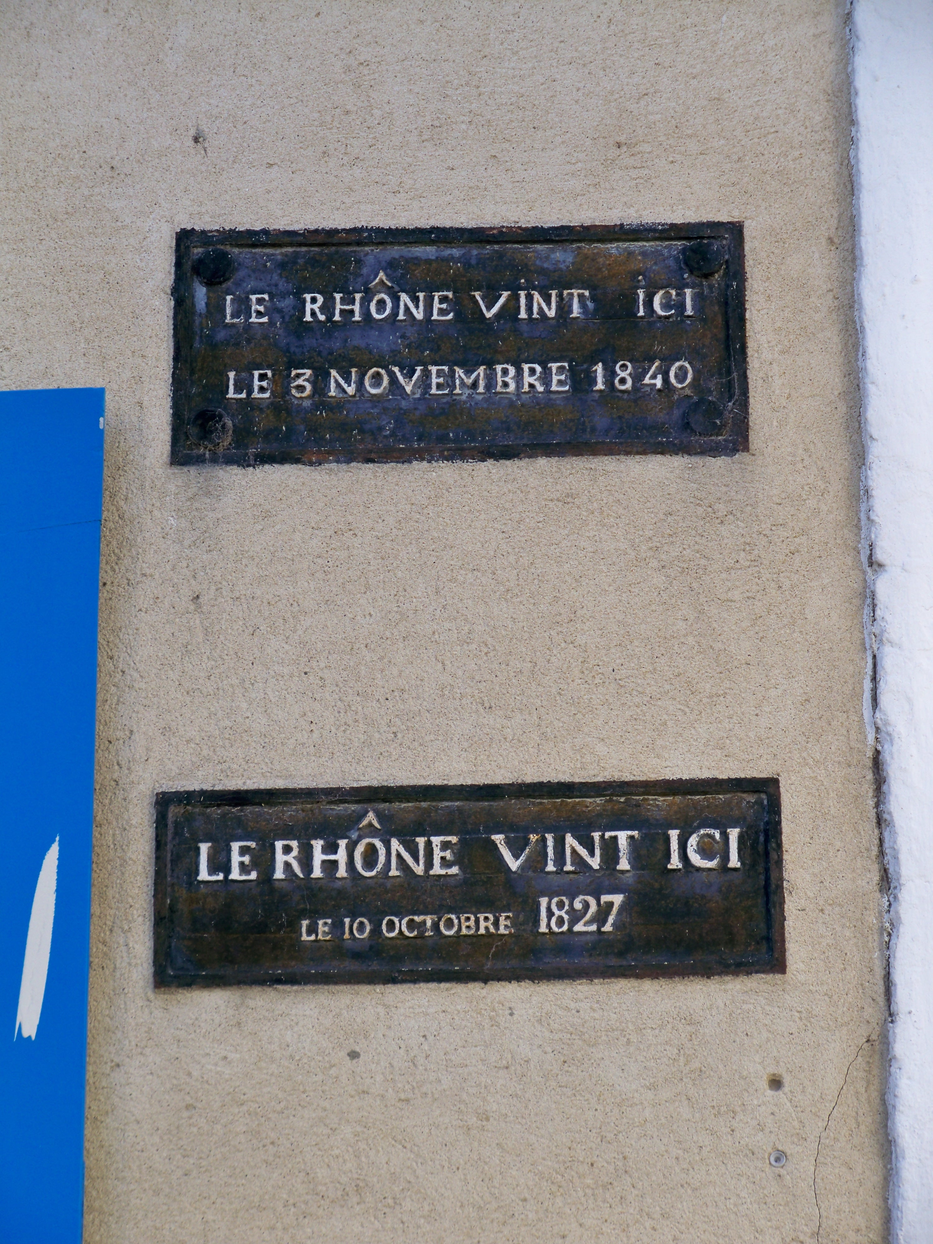 Marque des crues du Rhône, sur la mairie de Caderousse, Vaucluse, France